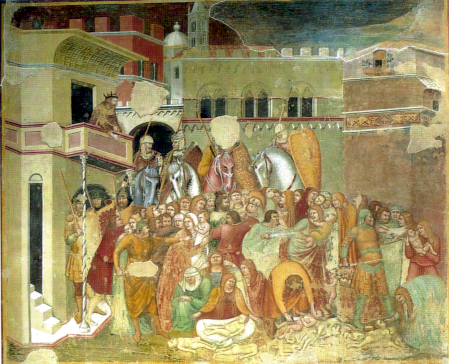 Pietro lorenzetti, strage degli innocenti